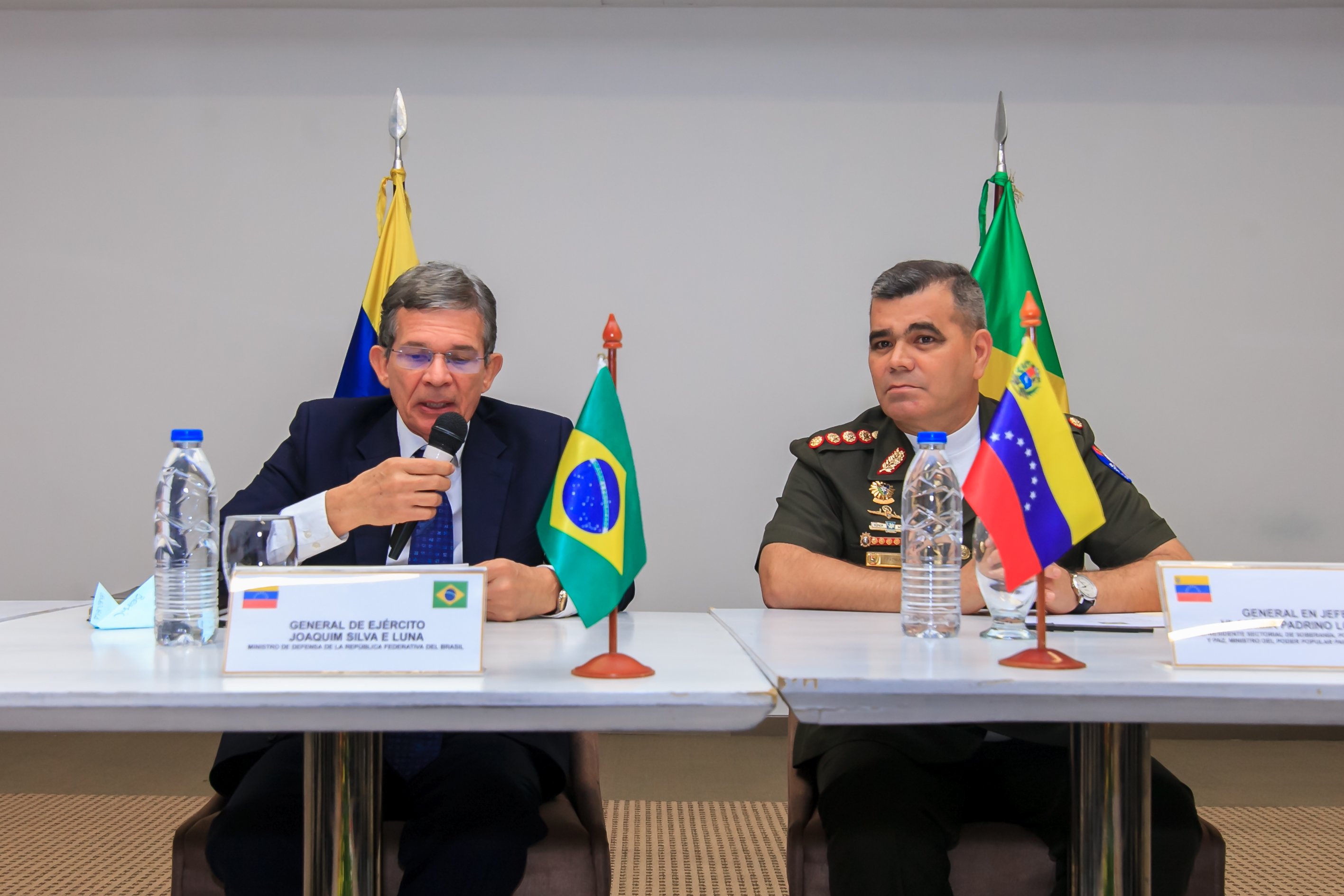 Foto: Alexandre manfrim